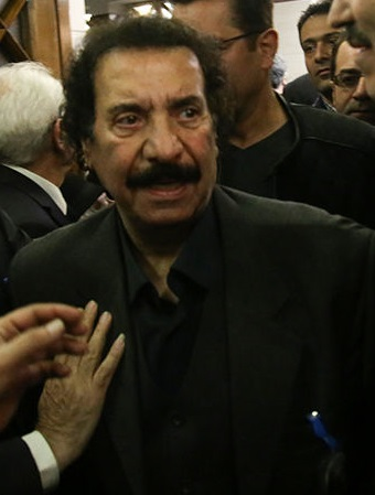 جواد یساری در یادبود جمشید مشایخی